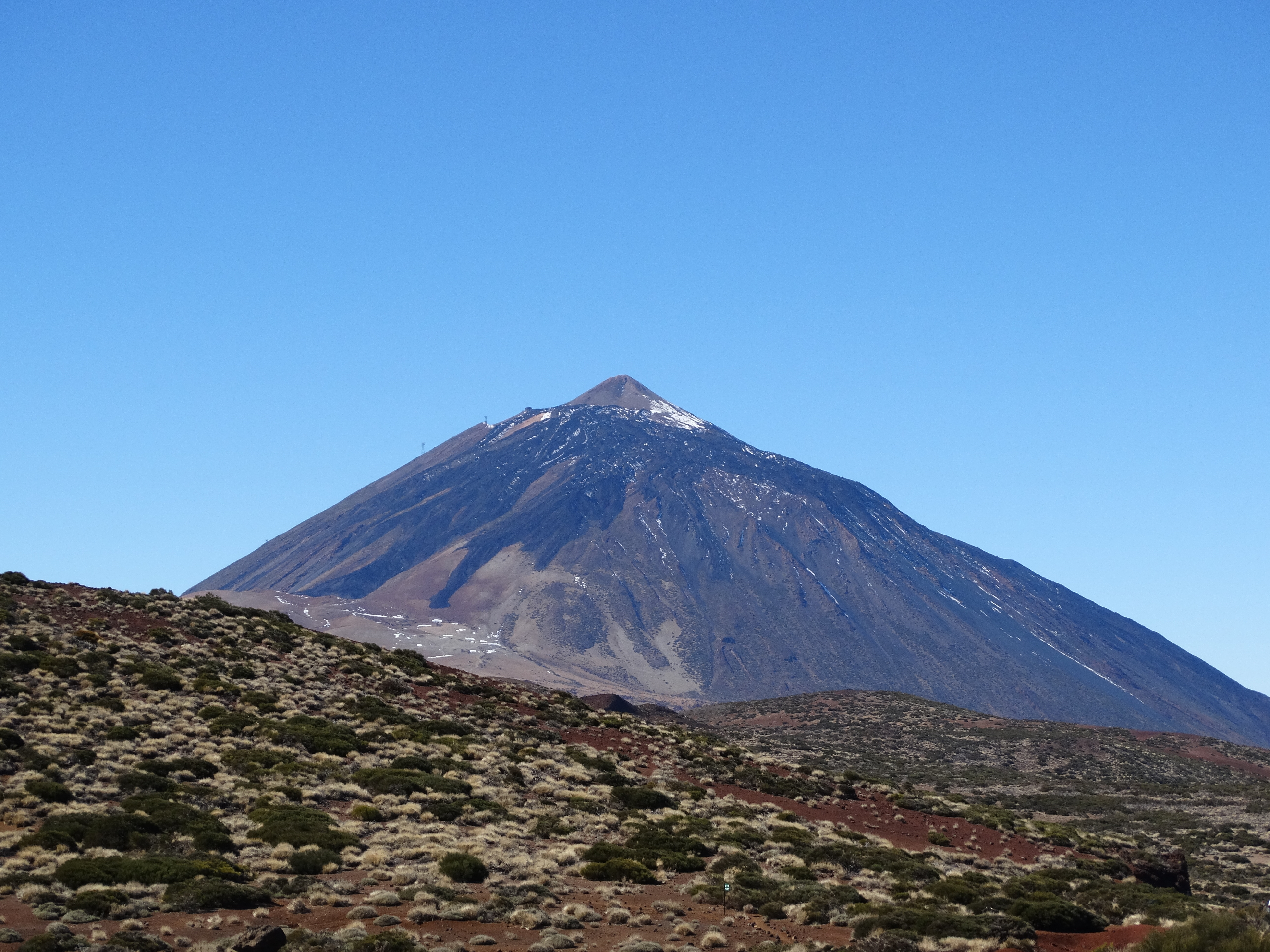 Teide, Tenerife. View from north-east (close to Observatorio del Teide)